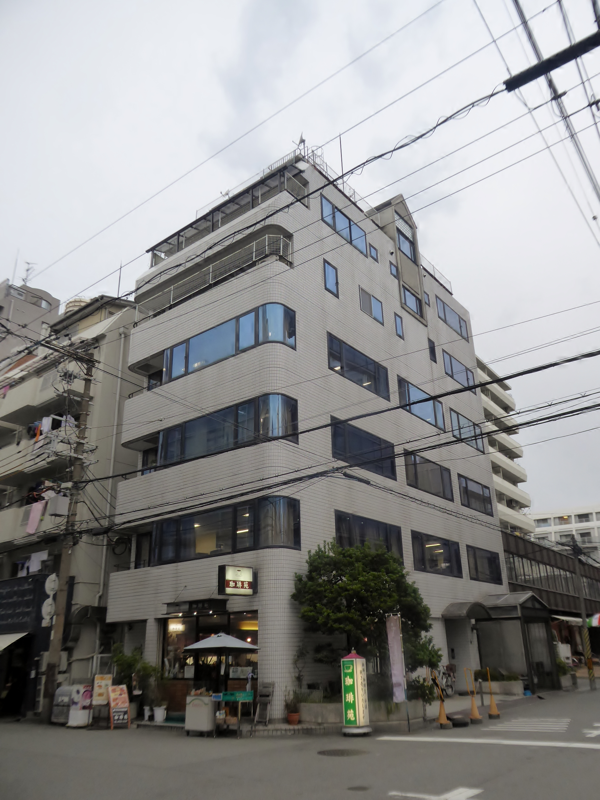 パークサイド河合ビルを撮影。